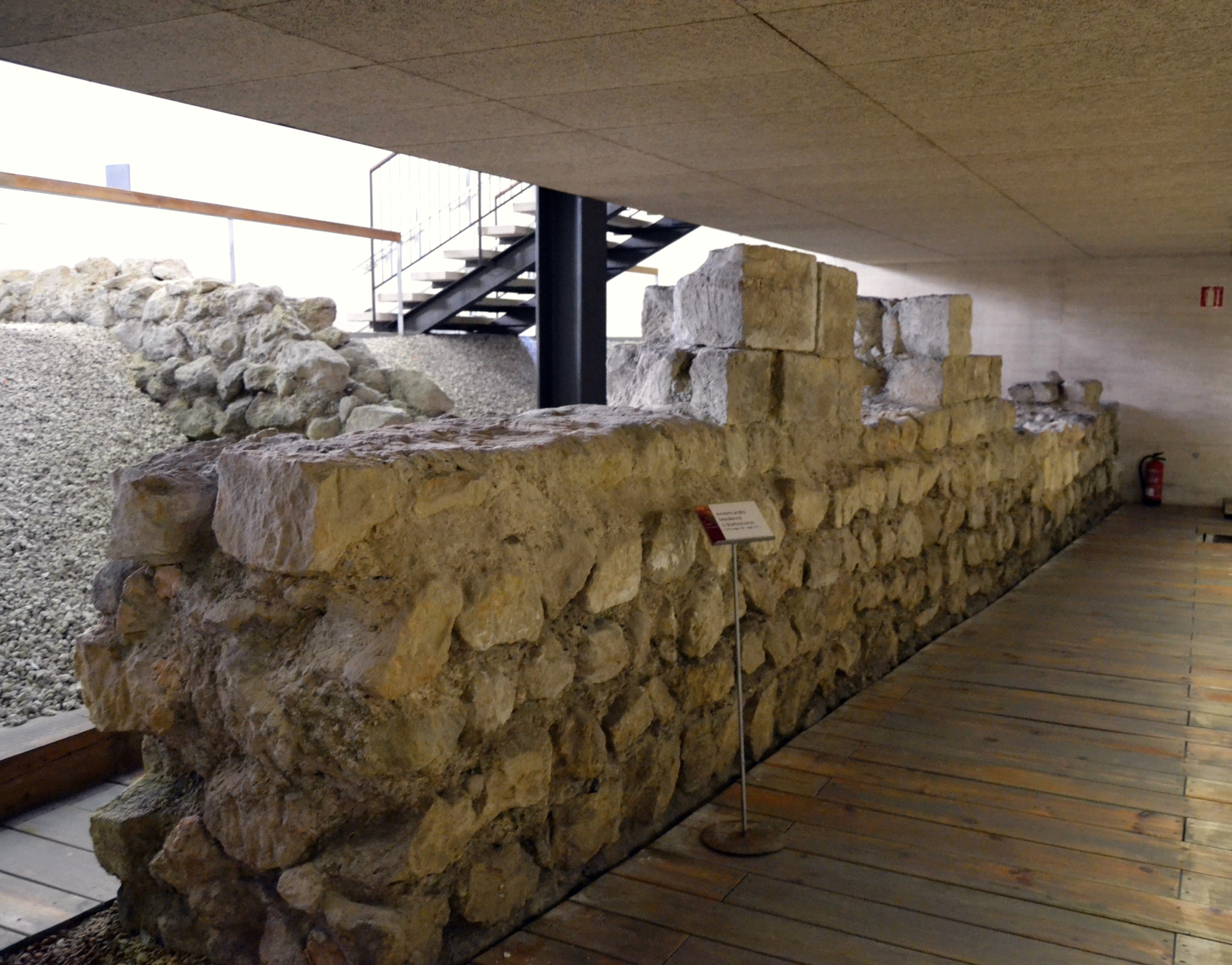 Avantmuralla medieval o barbacana, segona meitat del segle XIII - segle XV, Alacant (La Ciutat Descoberta).